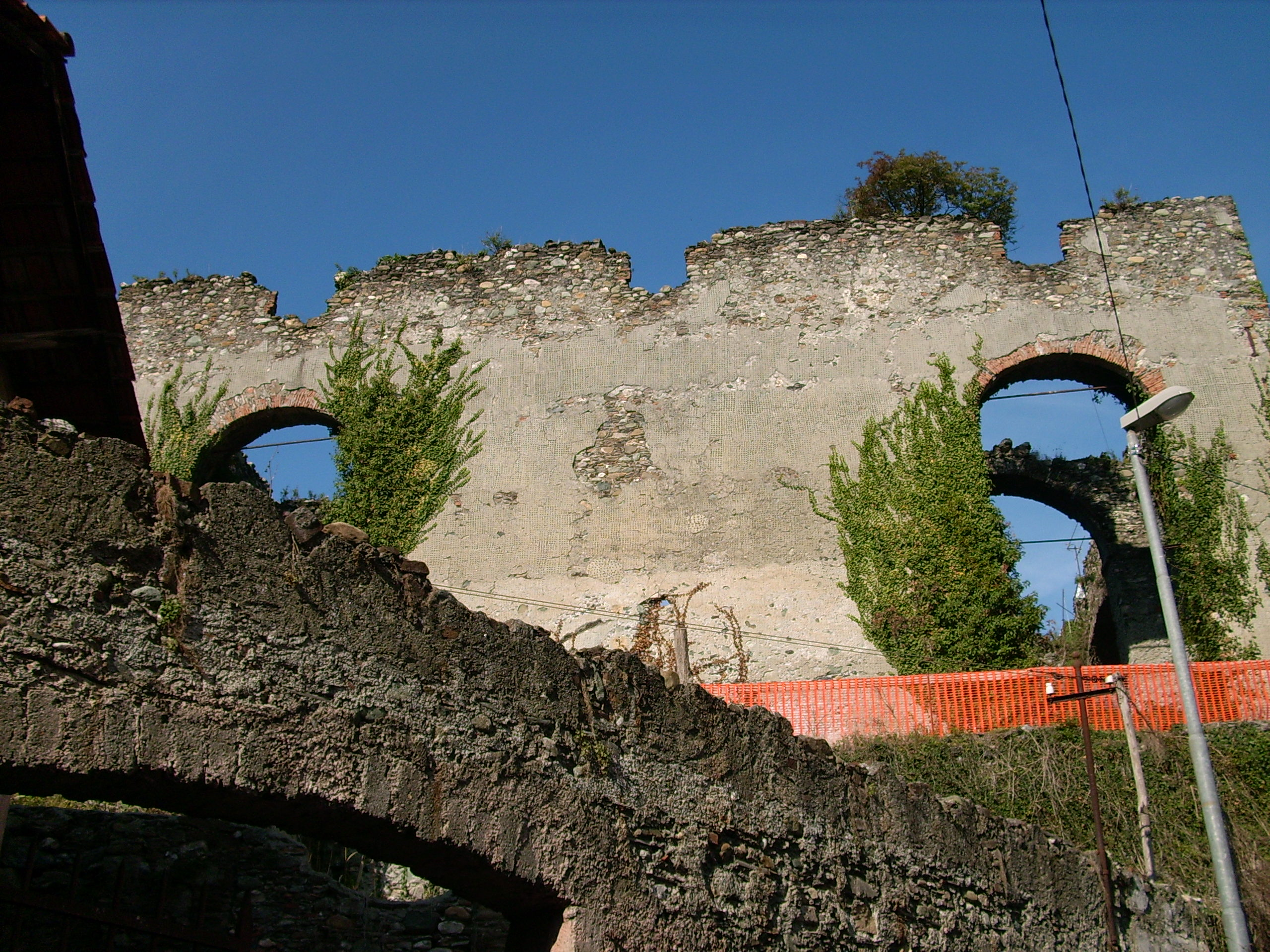 Ruderi del castello di Campomorone, Liguria, Italia